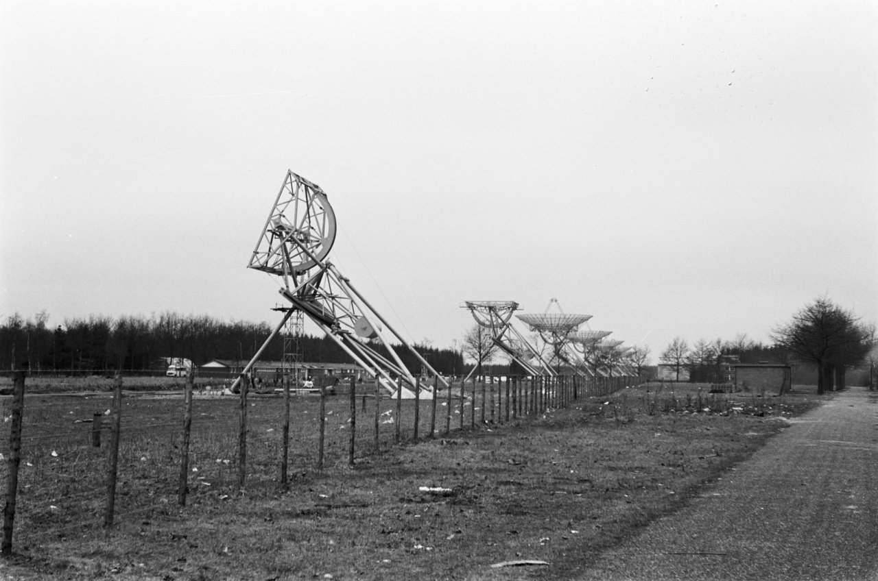 Werkzaamheden aan elf radiotelescopen in de bossen van Hooghalen in Drenthe